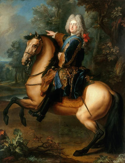 König August III. von Polen als Prinz zu Pferde